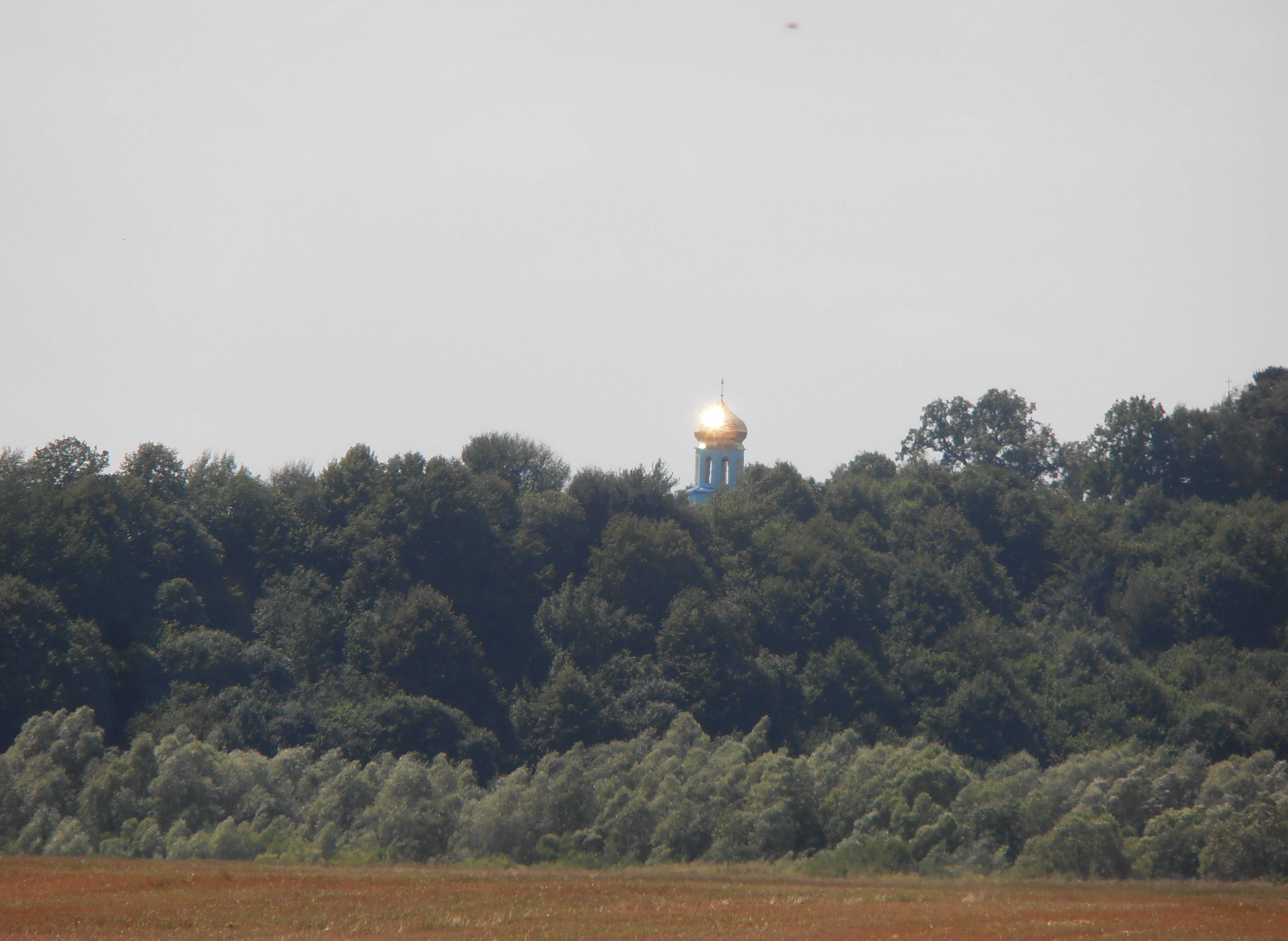 Церква